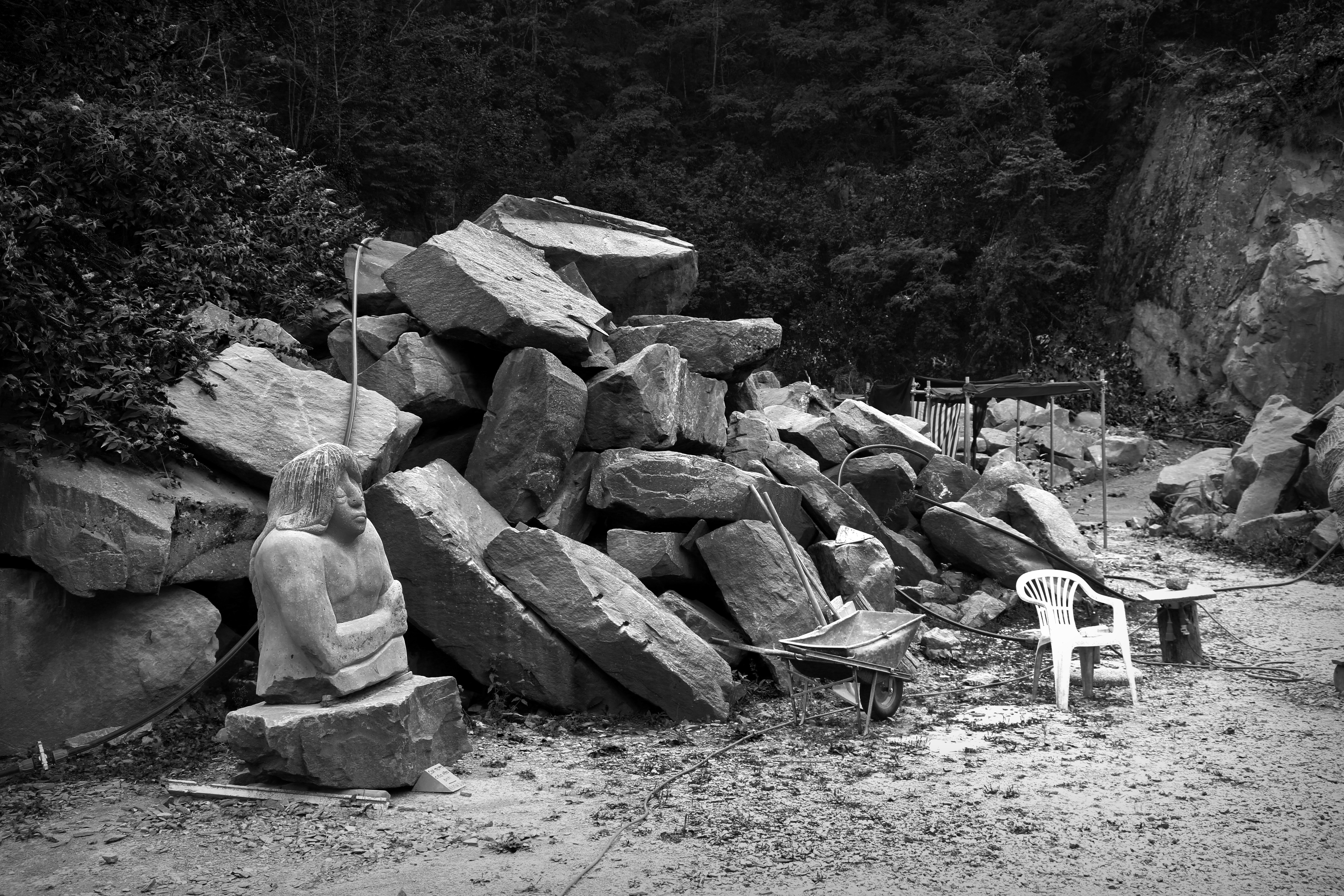 Cava Nardini This is a photo of a monument which is part of cultural heritage of Italy.